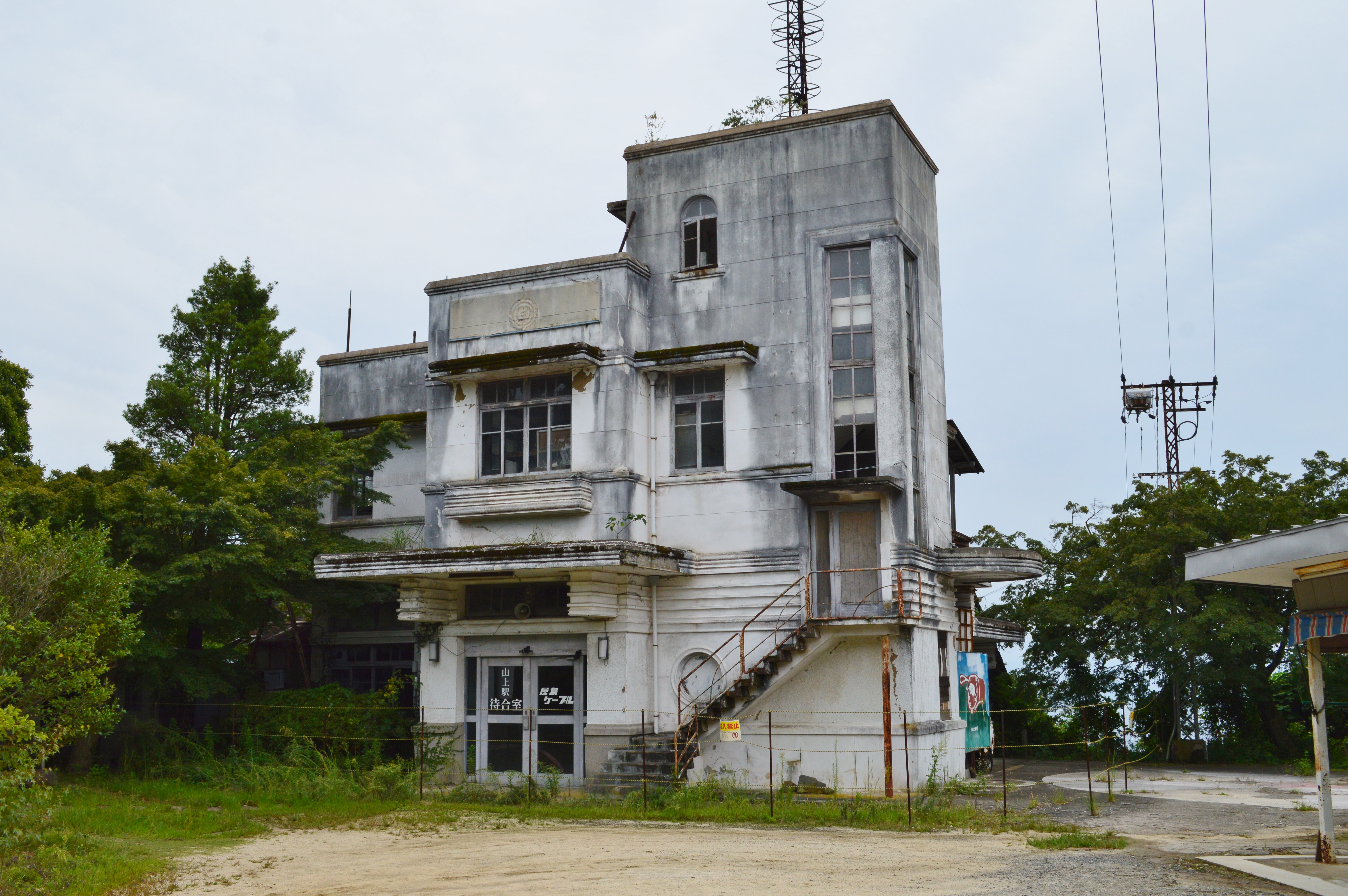 屋島ケーブル 屋島山上駅跡 駅舎